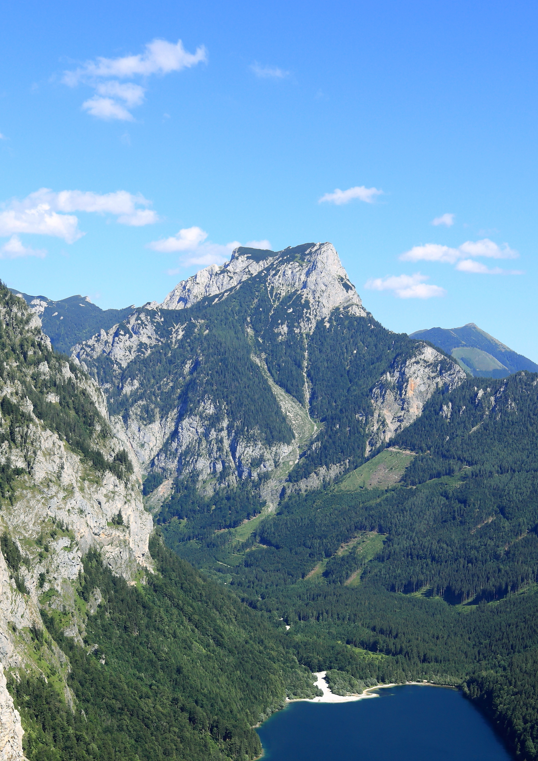 Nordwestansicht des 1871 Meter hohen Pfaffensteins mit dem Leopoldsteiner See im Vordergrund in der österreichischen Gemeinde Eisenerz im steirischen Bezirk Leoben.